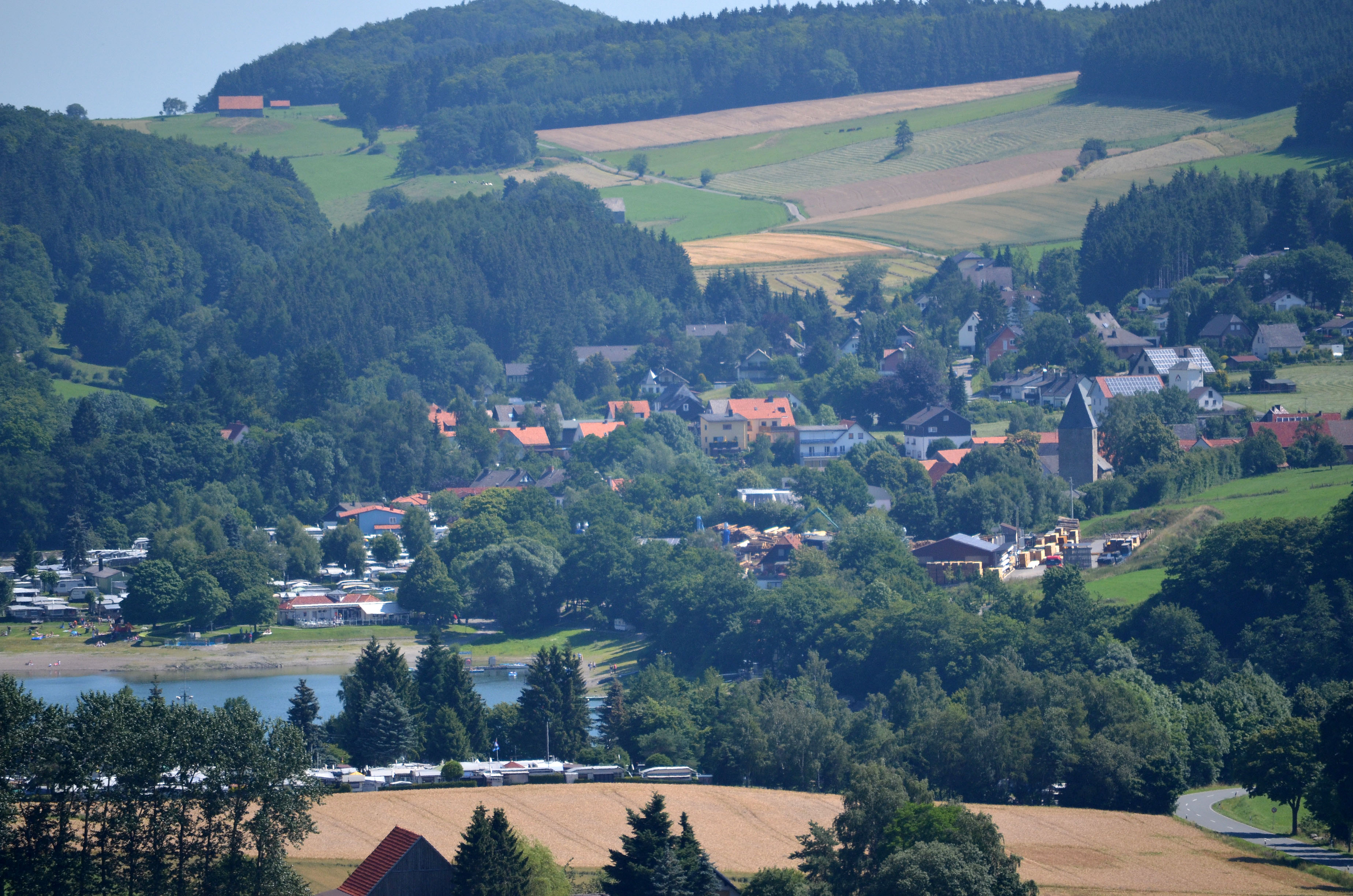 Heringhausen, Diemelsee, Blick auf Heringhausen 1